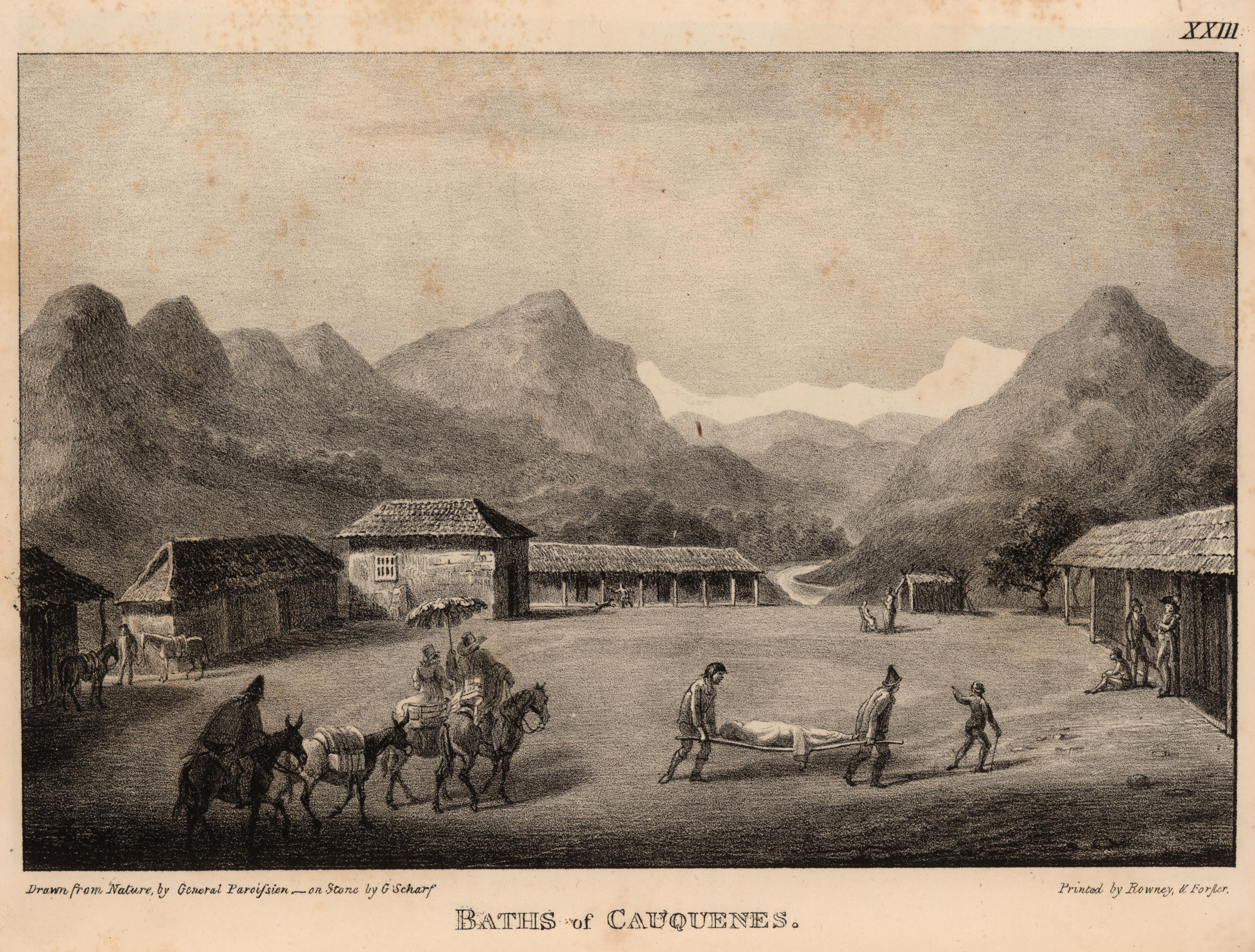 Vista de las termas de Cauquenes; en el primer plano, una pareja de viajeros llega a caballo con su animal de carga y sirviente mientras un bañista envuelto en sábanas es llevado en una camilla. Dibujo del médico inglés James Paroissien (conocido en América Latina como Juan Diego Paroissien o Diego Paroissien); litografía de George Johann Scharf impresa por Rowney & Forster y publicada por Peter Schmidtmeyer en su libro Travels into Chile, over the Andes, in the years 1820 and 1821, London: Longman, Hurst, Rees, Orme, Brown and Green, 1824.